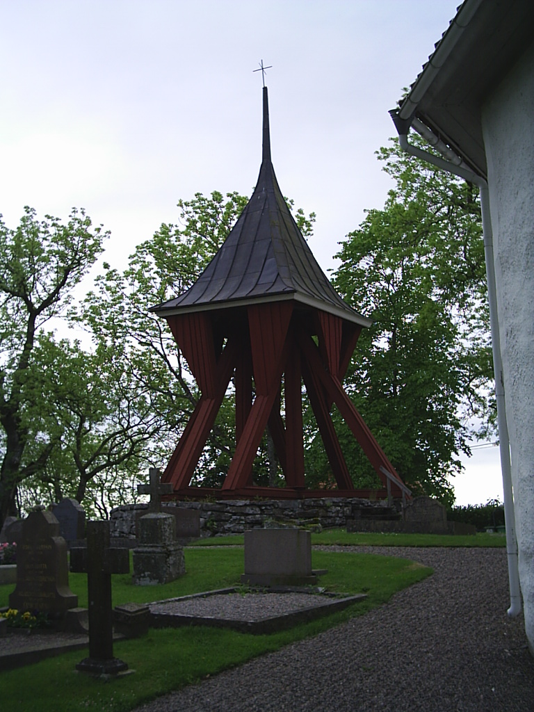 Klocksatpeln vid kyrkan i Rommele församling. Fotograf: Tubaist